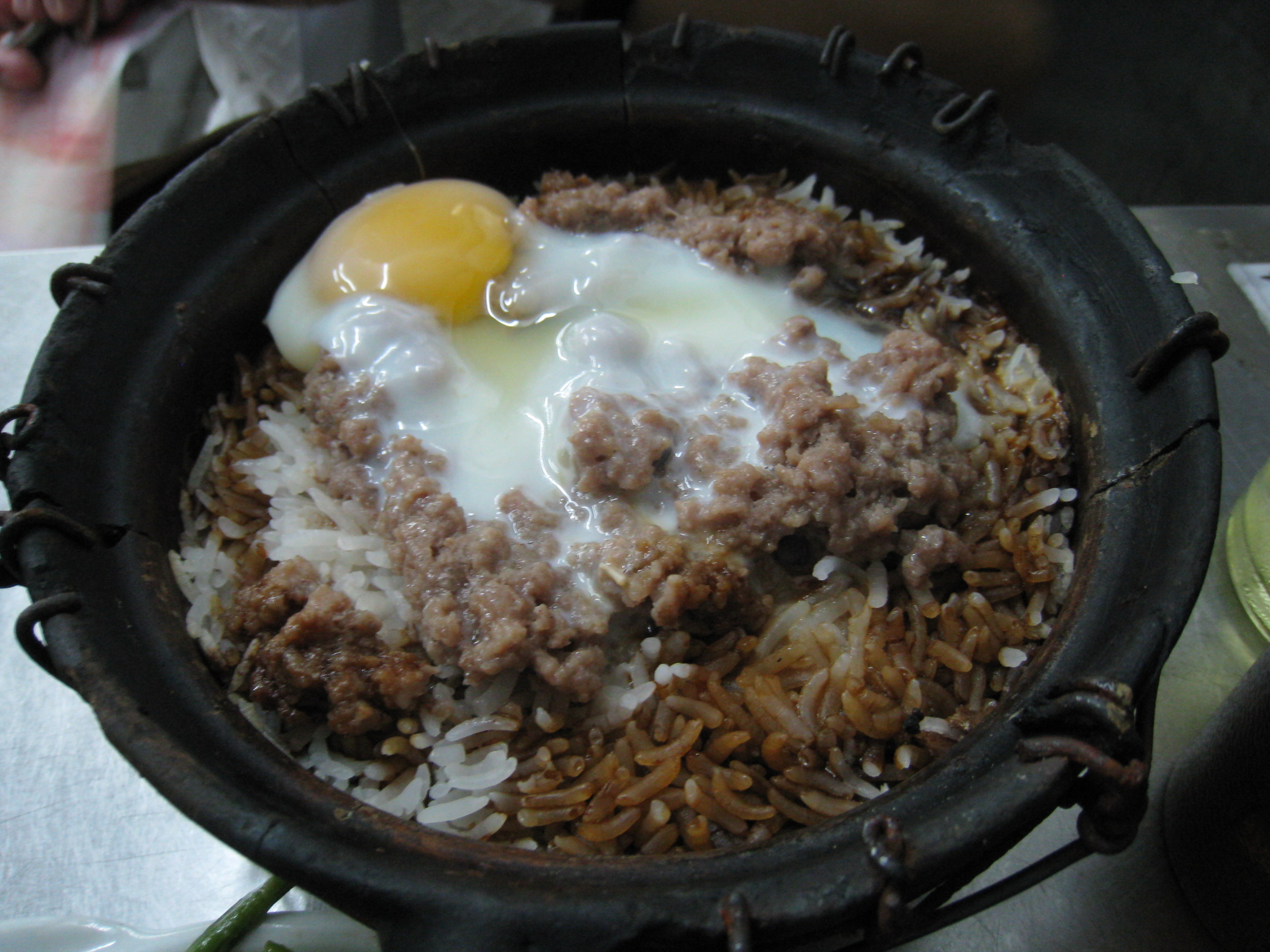 中文（香港）: 窩蛋牛肉煲仔飯